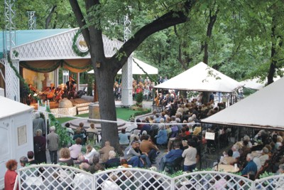 Konkurs Teatrów Ogródkowych; Ogrody Frascatii 2006